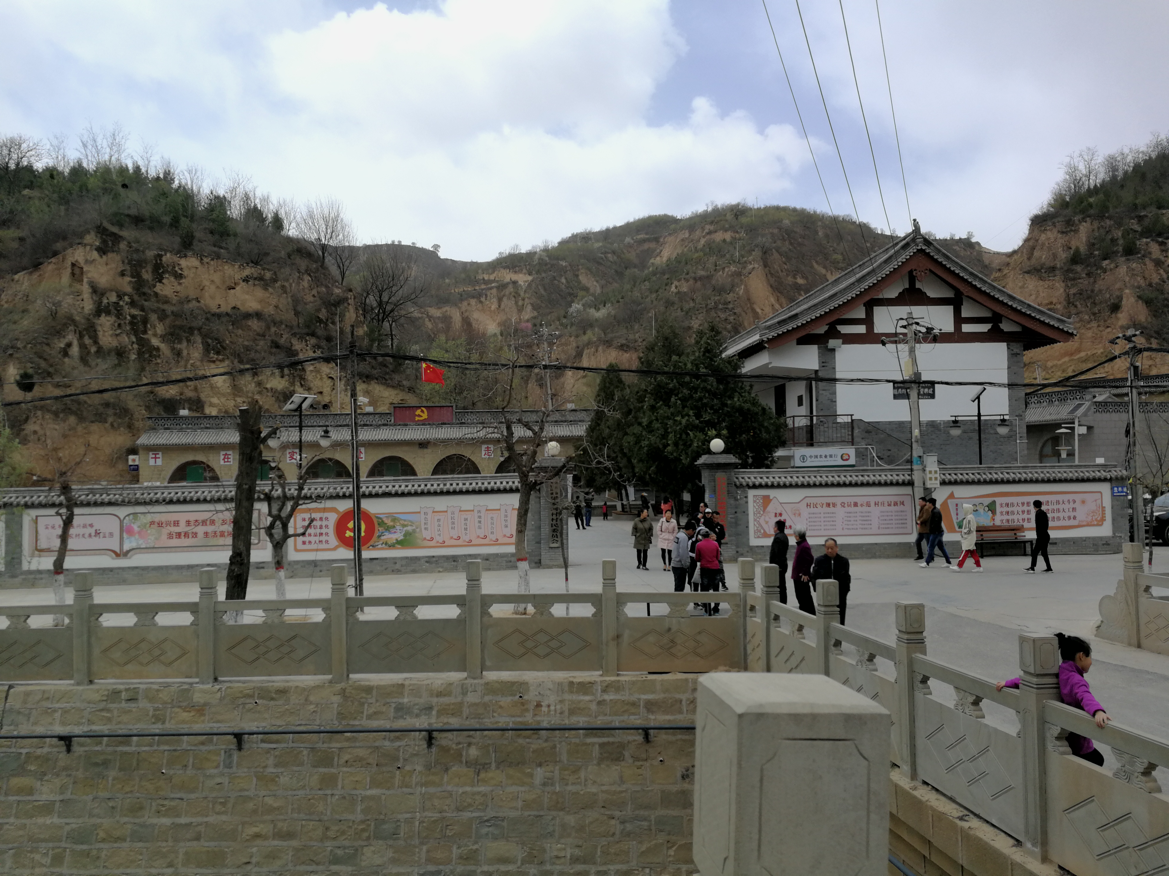 延安市延川县文安驿镇梁家河村